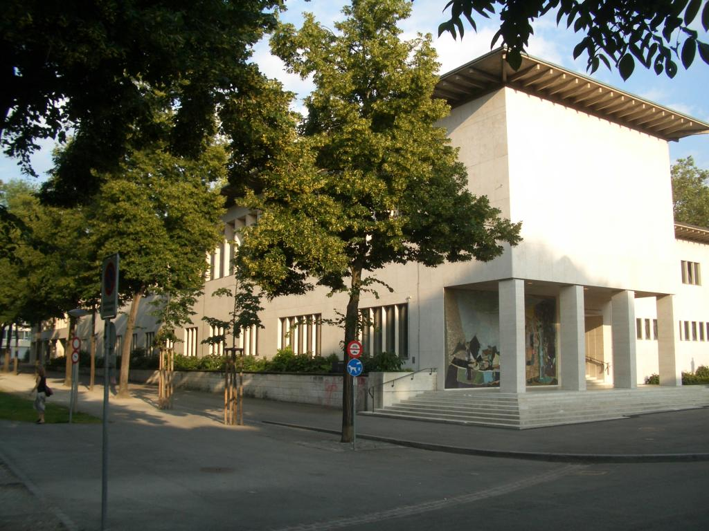 Kollegiengebäude der Universität Basel (für die GNU FDL)